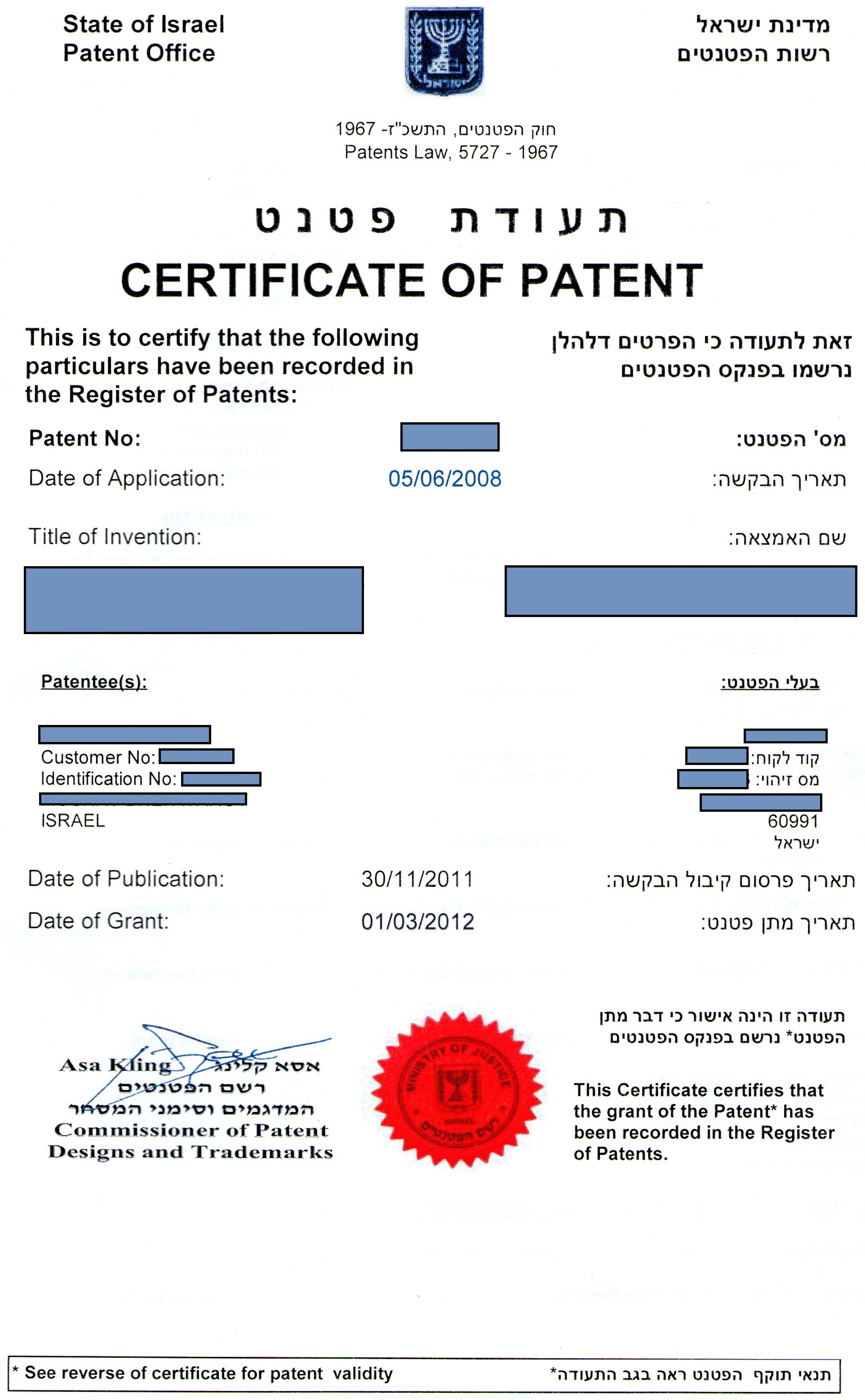 תעודת פטנט ללא שמות